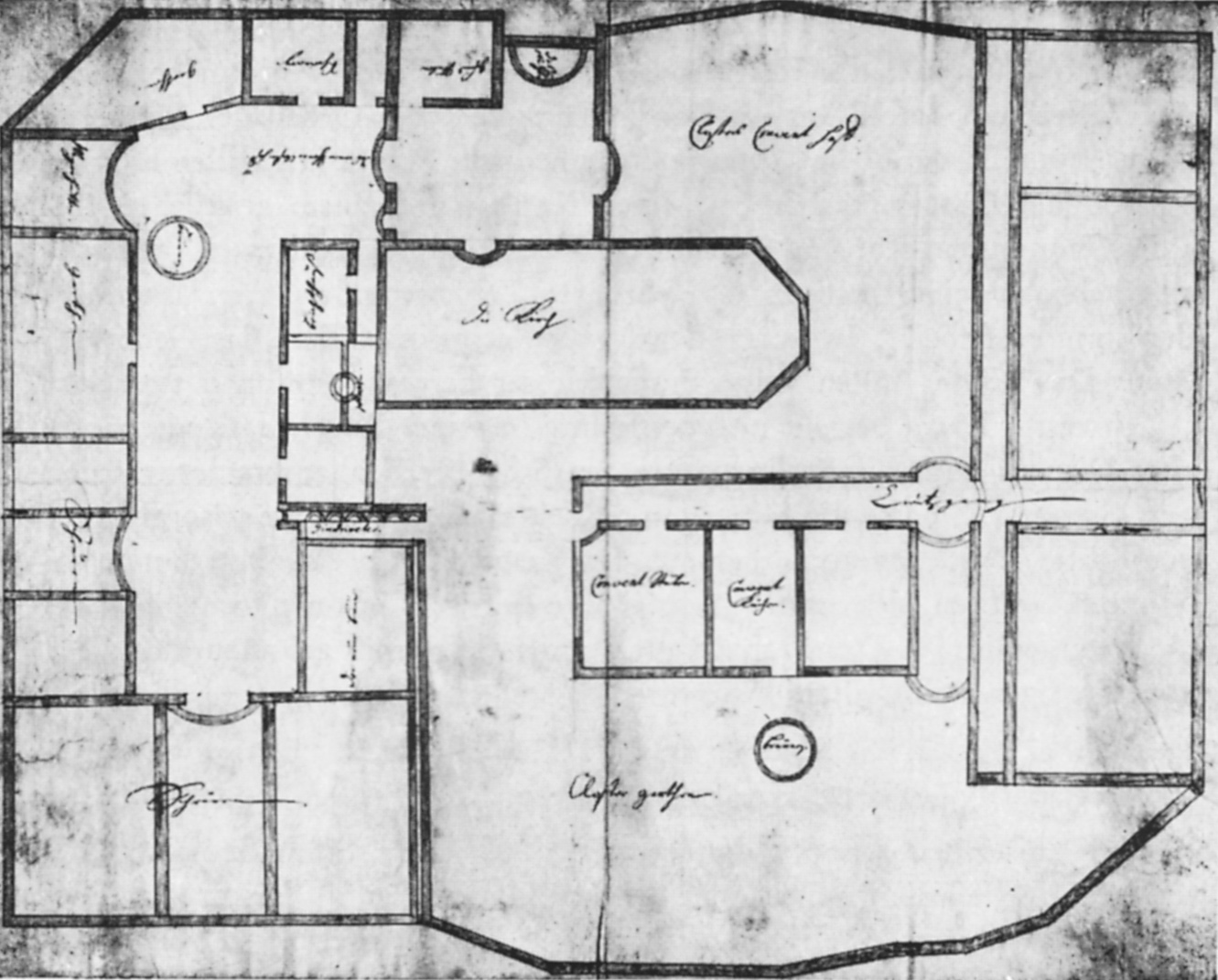 Grundriss des Klaraklosters in Heilbronn, Plan von 1723